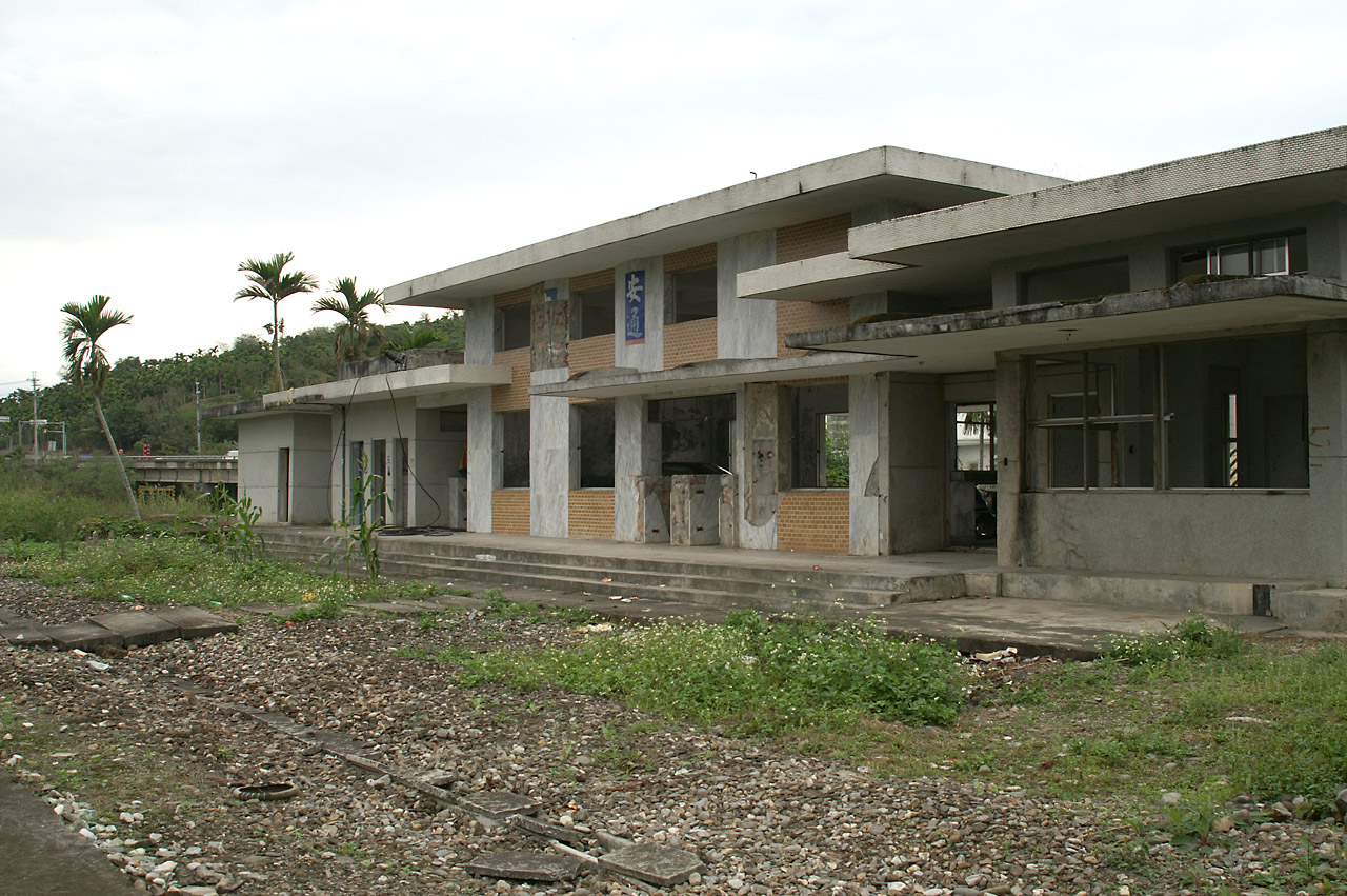 安通駅